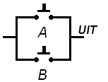 Skakelaar stroombaandiagram vir die OF-hek